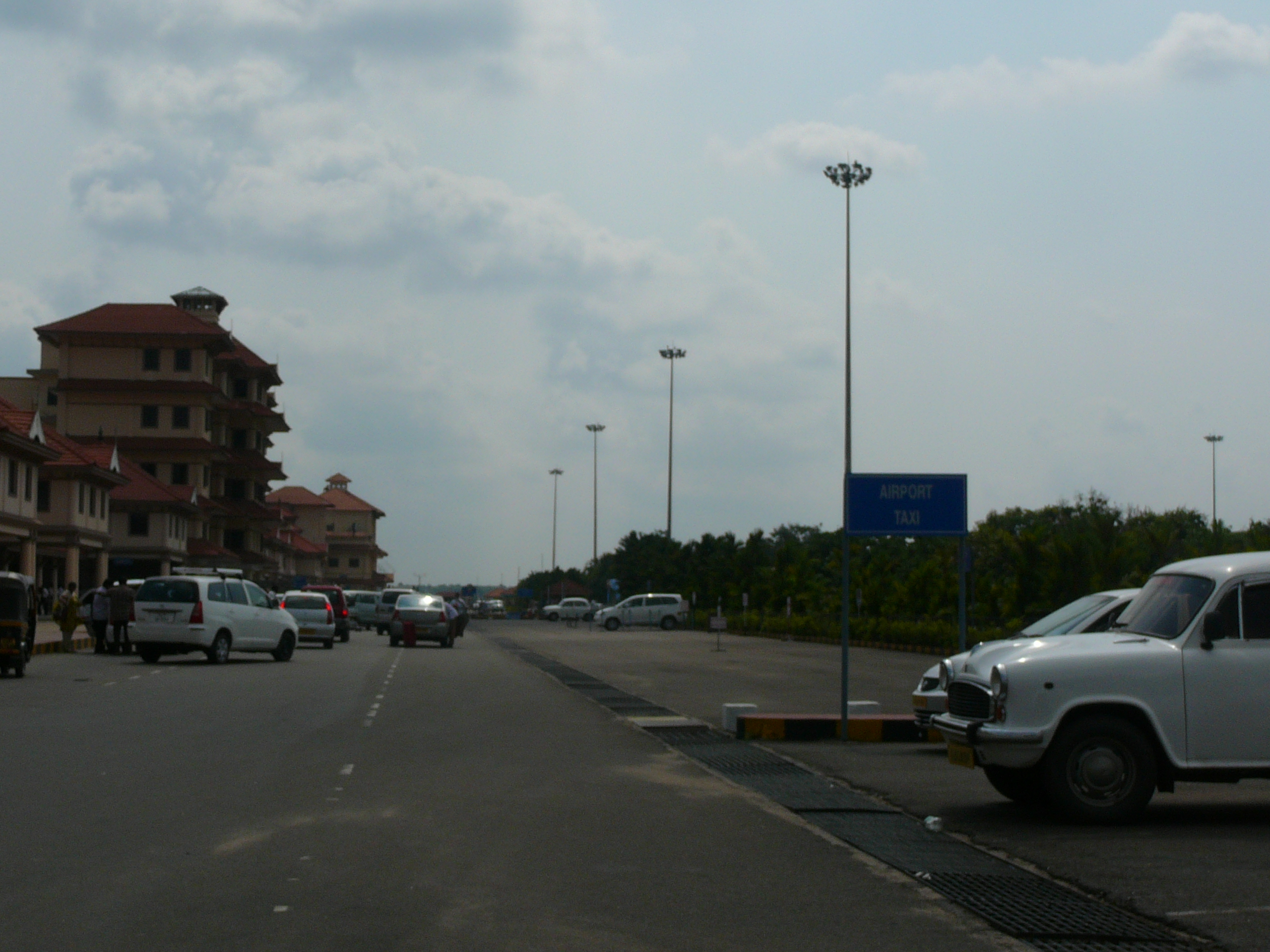 Aparcamiento de CIAL.